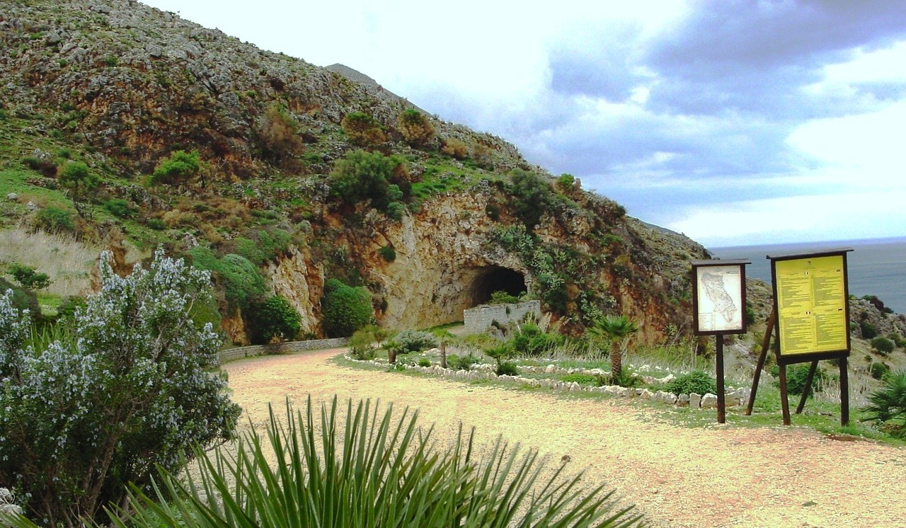 Riserva naturale dello Zingaro, Sicily